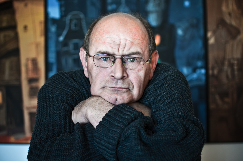 Bolesław Polnar fot. Sławomir Mielnik